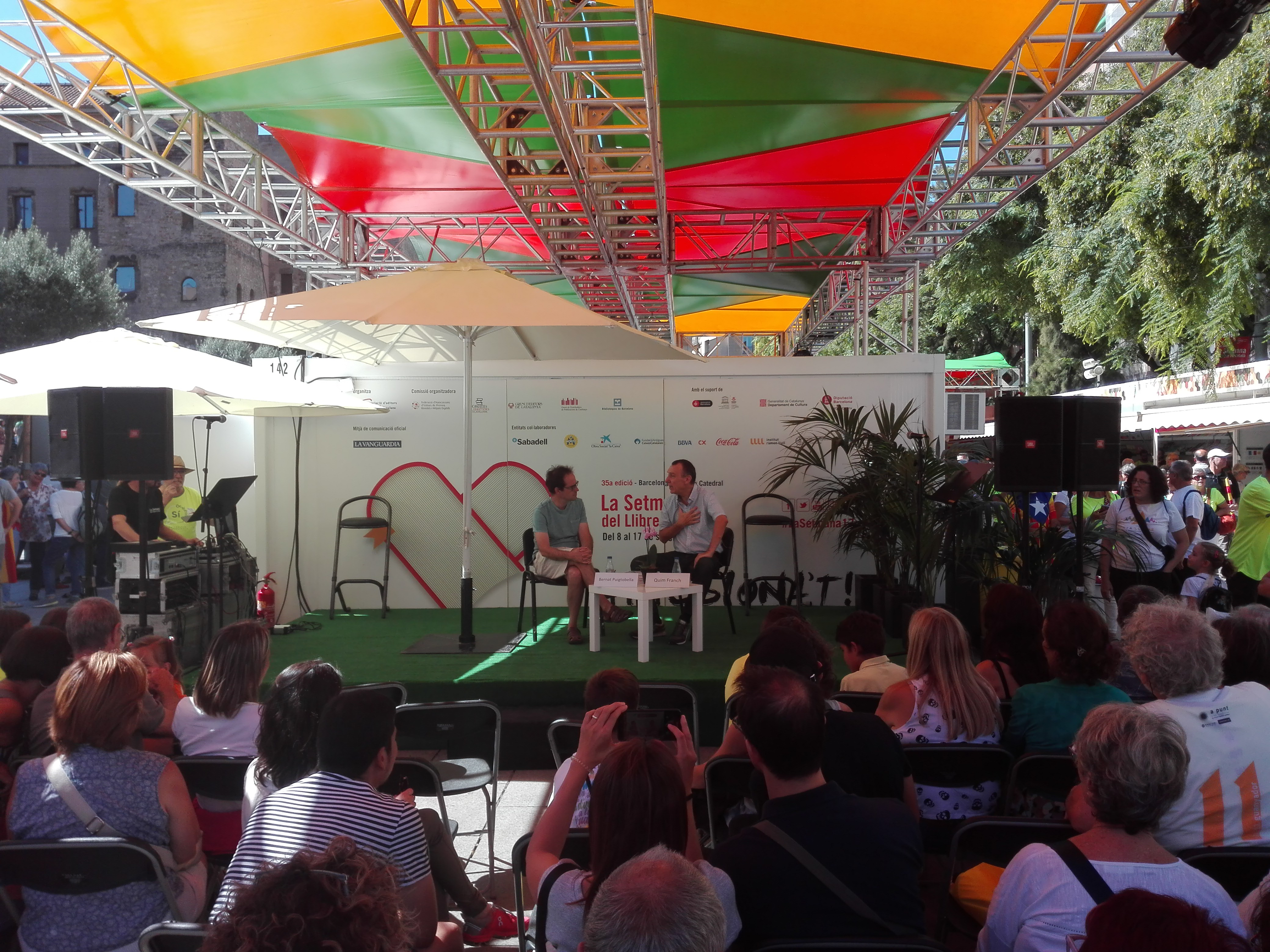 Presentació del llibre Abans de fer política a l'escenari 1 de la Setmana del llibre en català de 2017 a Barcelona.